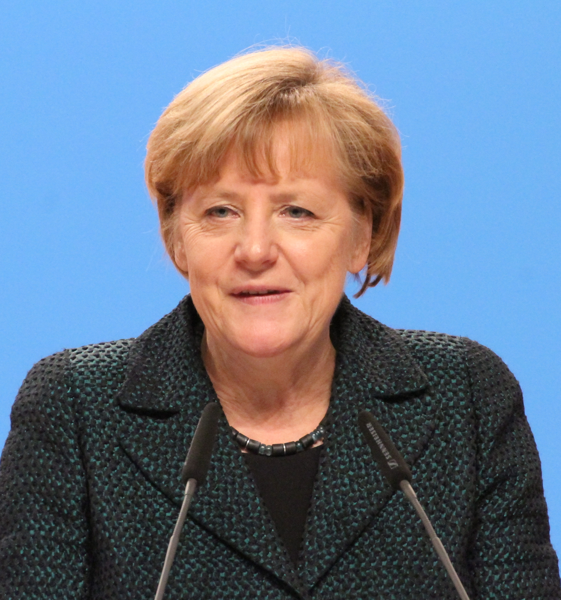 Angela Merkel auf dem CDU Bundesparteitag Dezember 2014 in Köln